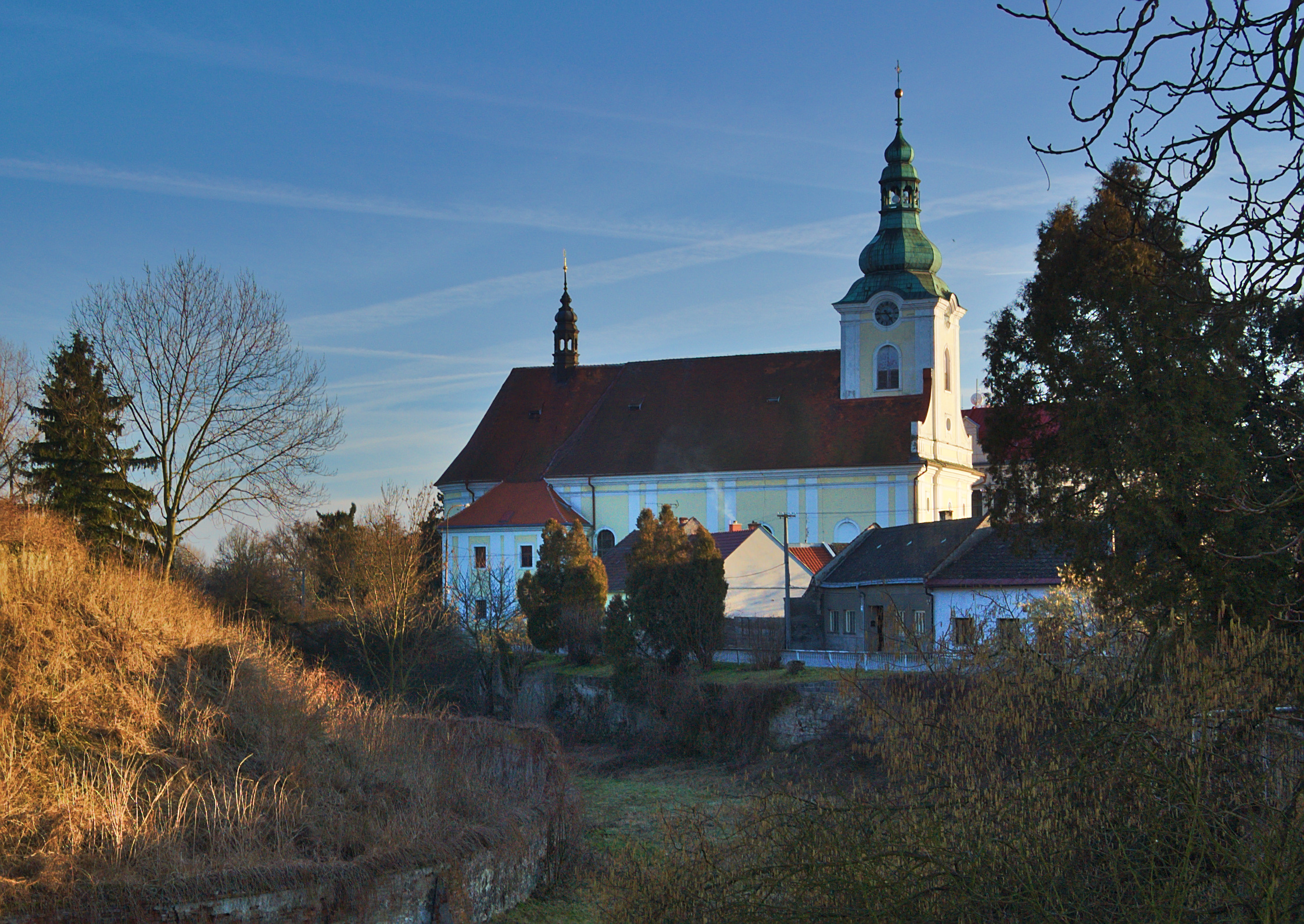 Kostel svatého Václava, Tovačov, okres Přerov